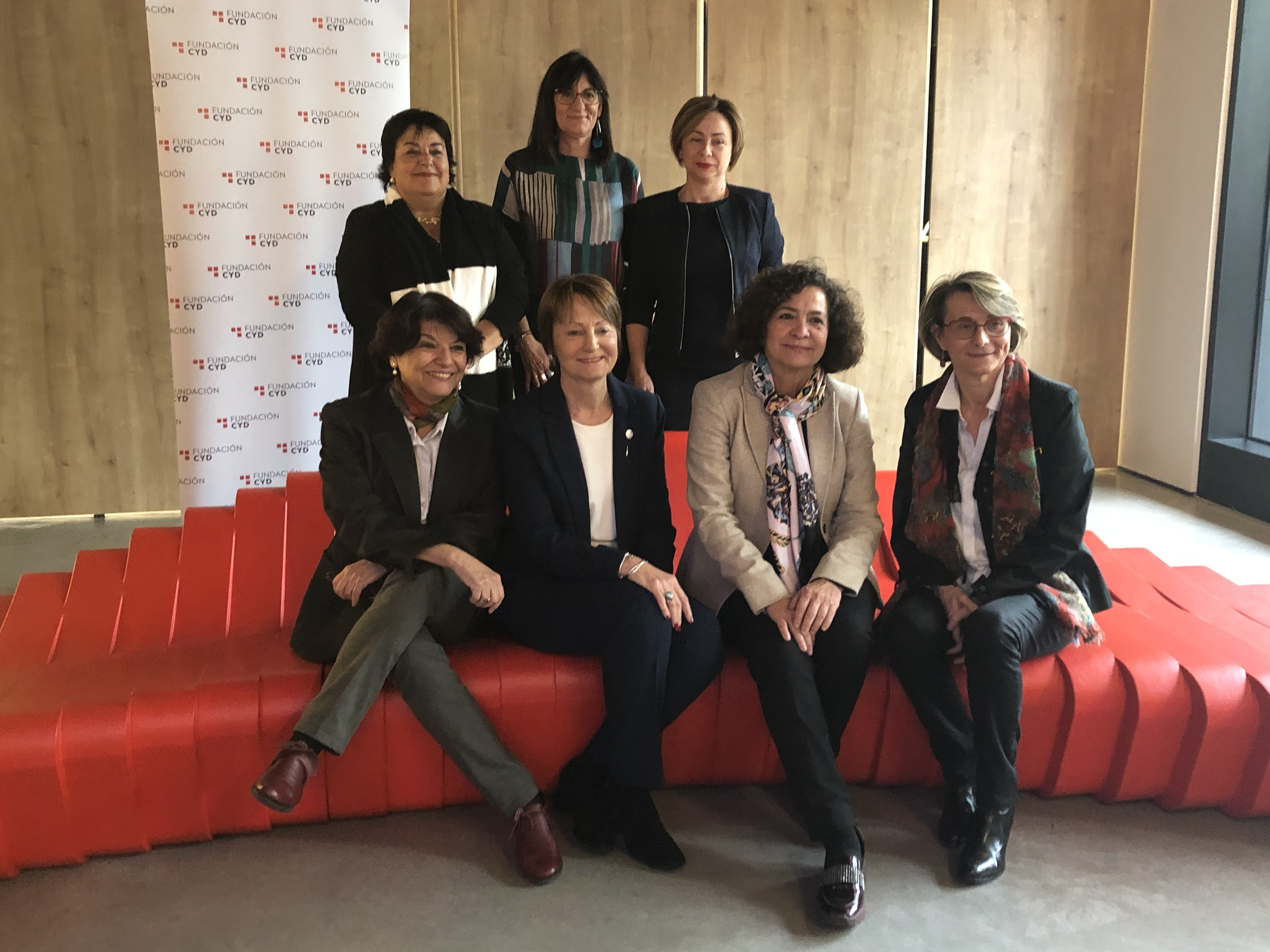 Sentadas: Soledad Murillo, María Vicenta Mestre (Universidad de Valencia), Pilar Aranda (Universidad de Granada), Eva Alcón (Universitat Jaume I), De pié: María José Figueras (Universidad Rovira I Virgili), María Antonia Peña (Universidad de Huelva), Rosa Aguilar (Rectora Universidad de La Laguna) Debate "El liderazgo de la Mujer en la Universidad" con la participación de seis rectoras de universidades: Rosa Aguilar (Universidad de La Laguna) Eva Alcón (Universidad Jaume Ier) Pilar Aranda (Universidad de Granada) María José Figueras (Universidad Rovira i Virgili), María Vicenta Mestre (Universidad de Valéncia) y María Antonia Peña (Universidad de Huelva)